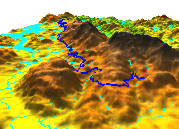 Der Oberlauf des Schwarzenbergschen Schwemmkanals